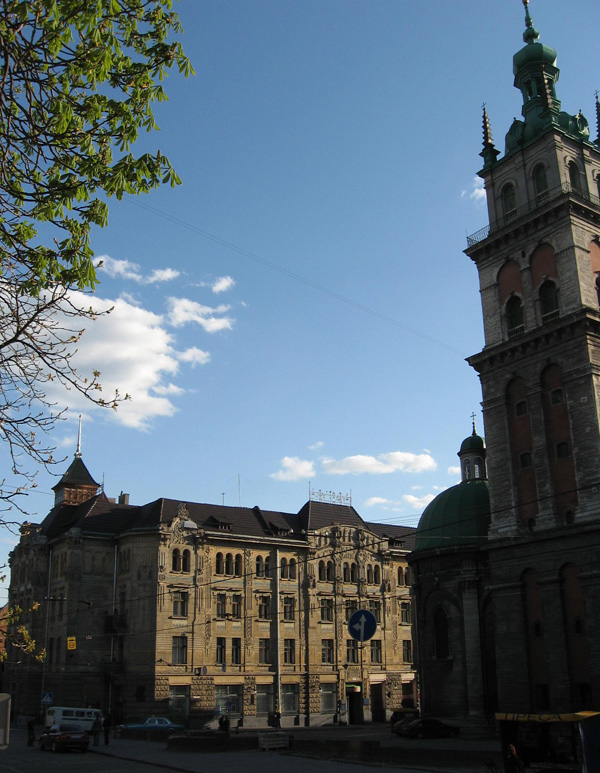 Dnestr building and Kornyakt tower in Lvov